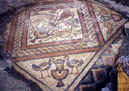 frühchristliches Mosaik, Kirchenfußboden aus dem 6. Jahrhundert, Lin am Ohridsee (Albanien) - selbst fotografiert